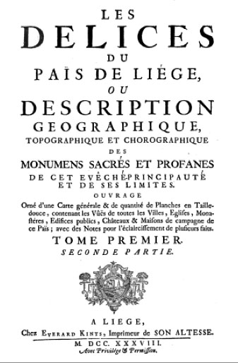 Frontispice des Délice du pays de Liège